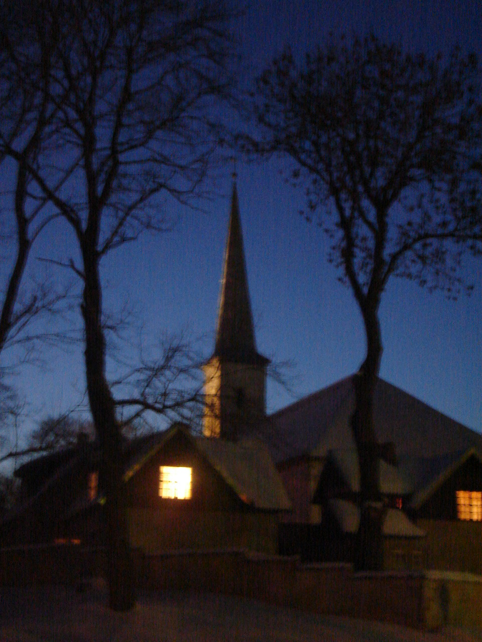 Jõhvi church. Author: Geniu Geniu 9. maaliskuuta 2006 kello 19.01 (UTC)Geniu